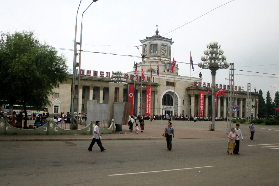 Pyongyang station, North Korea